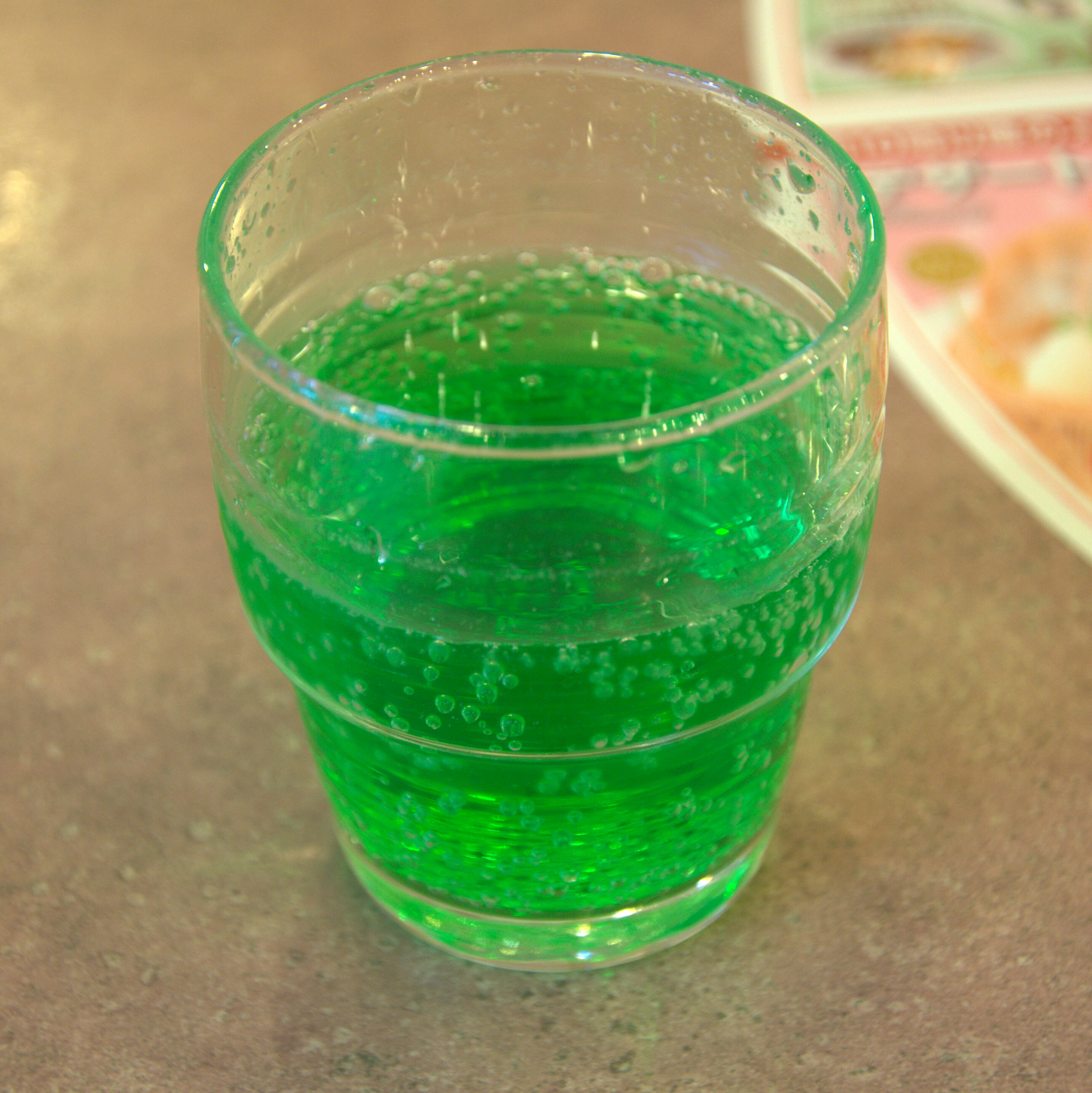 Fanta melon